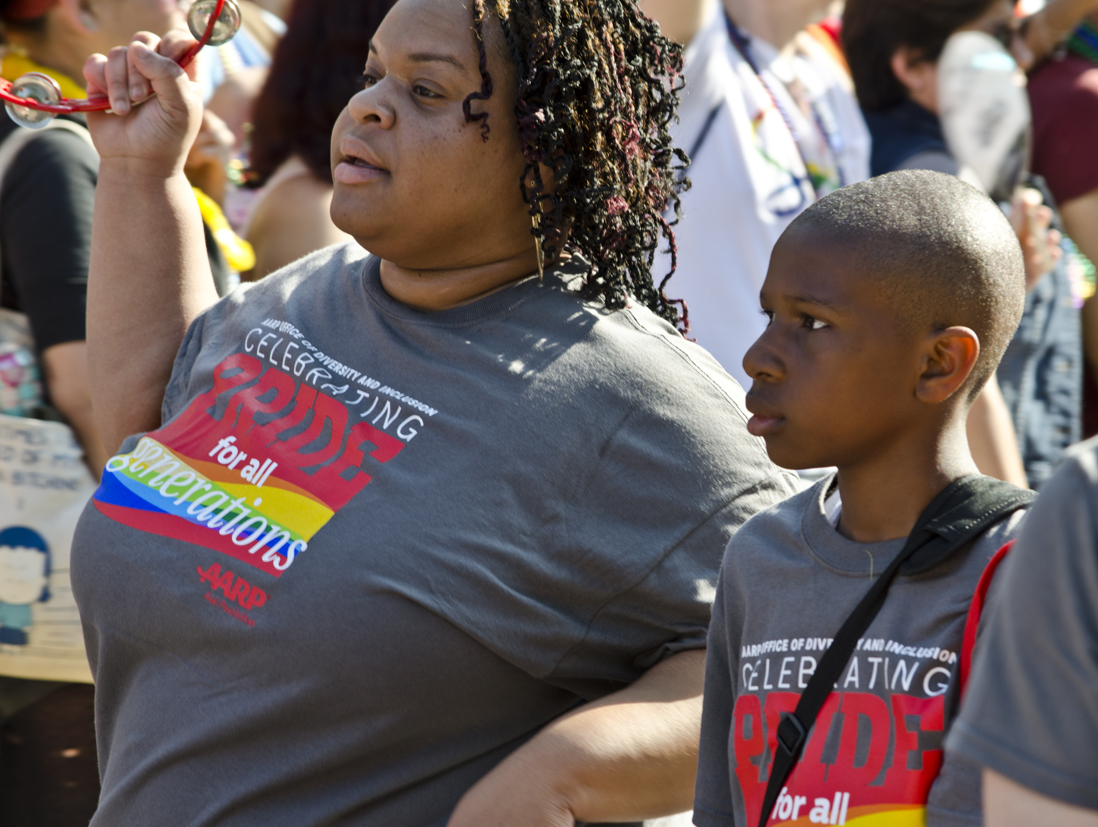 me and mom - DC Capital Pride parade - 2013-06-08